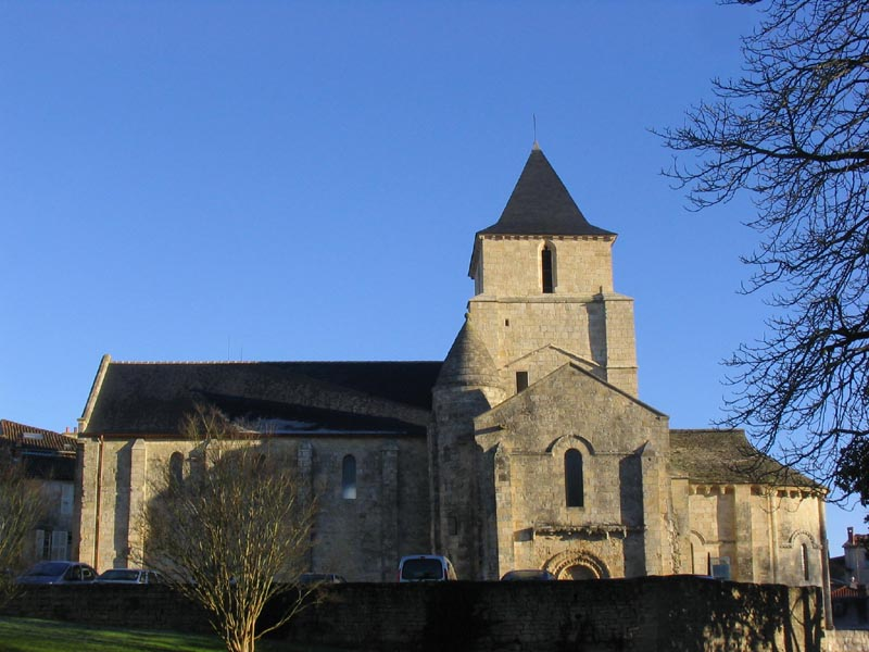 Église de Saint-Savinien à Melle (Deux-Sèvres) en France.